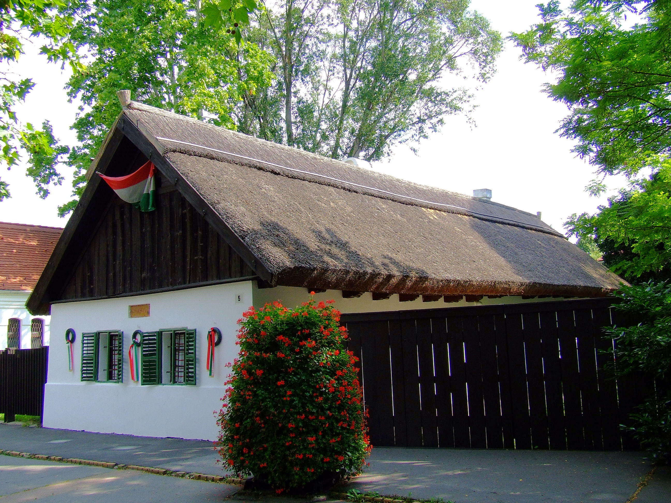 Petőfi Sándor szülőháza Kiskőrösön This is a photo of a monument in Hungary. Identifier: 2276